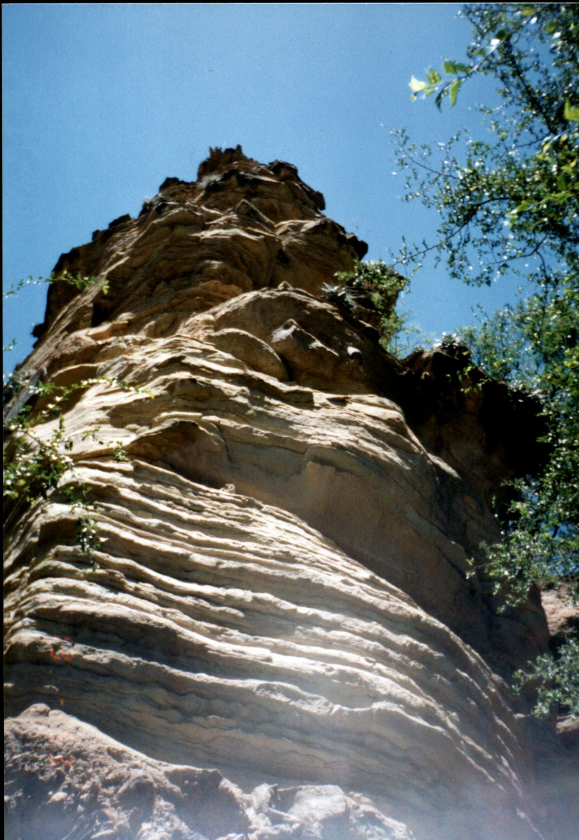 Formación rocosa, producto de la erosión, pasando el dique de Olta